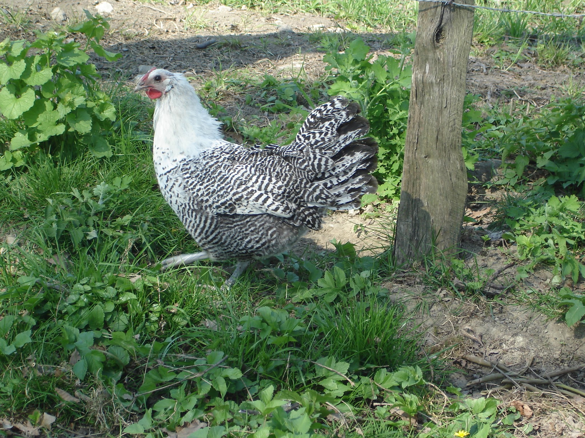 Der westfälischer Totleger ist eine vom aussterben bedrohte Hühnerrasse.